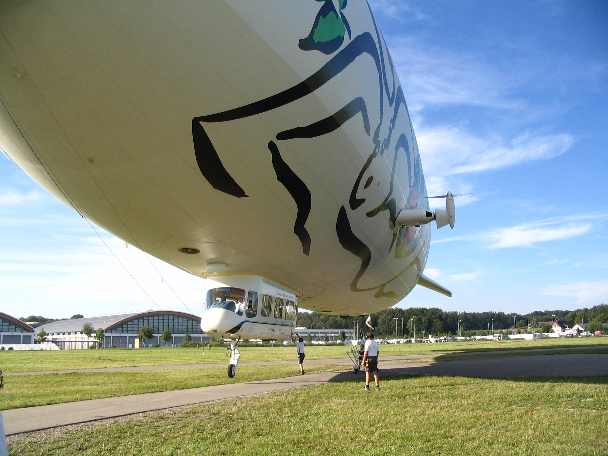 Zeppelin NT (D-LZZF): Landung in Friedrichshafen